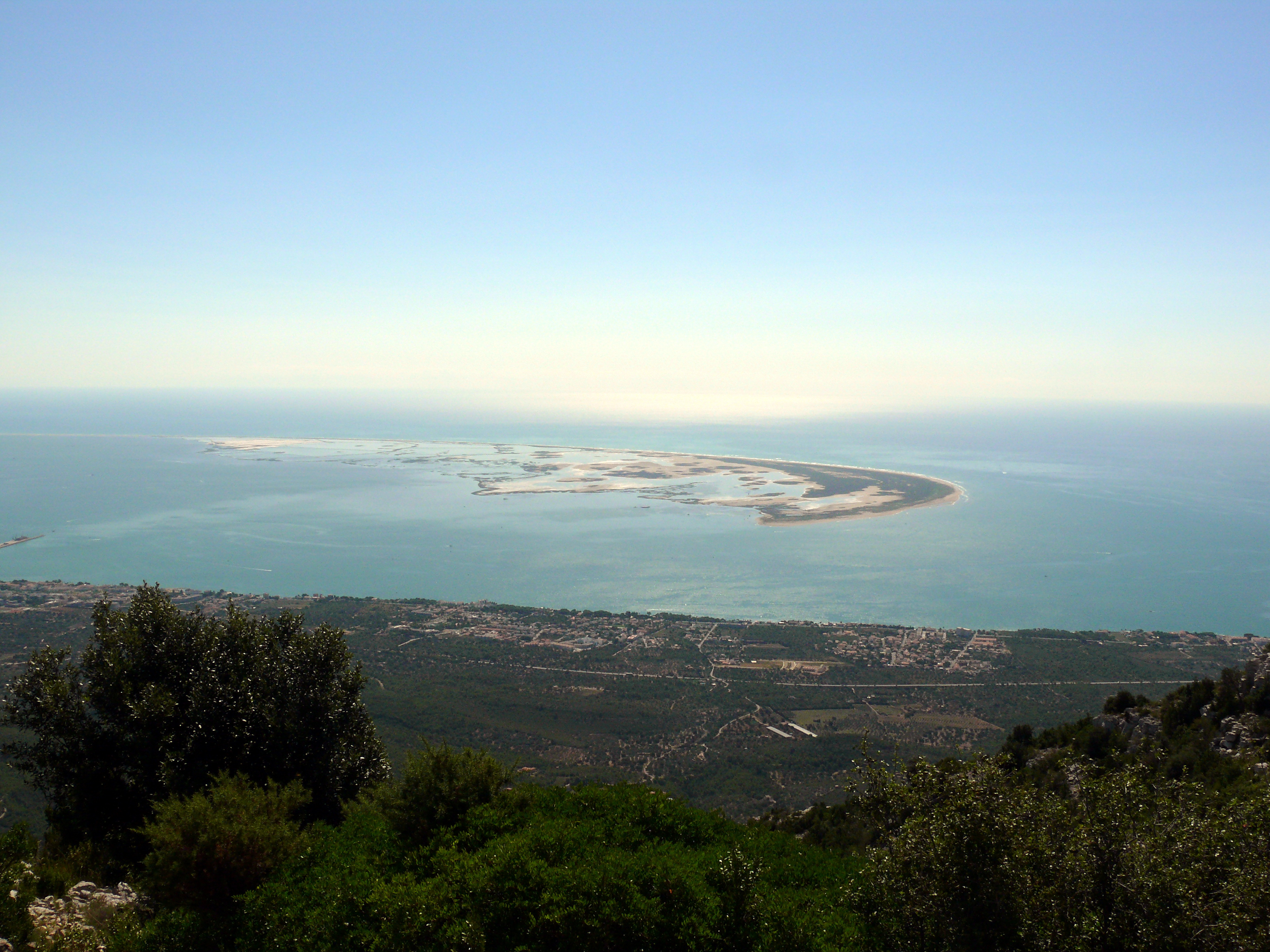 Torreta de Montsià This is a a photo of an emblematic summit in Catalonia, Spain, with id: CE-250163006